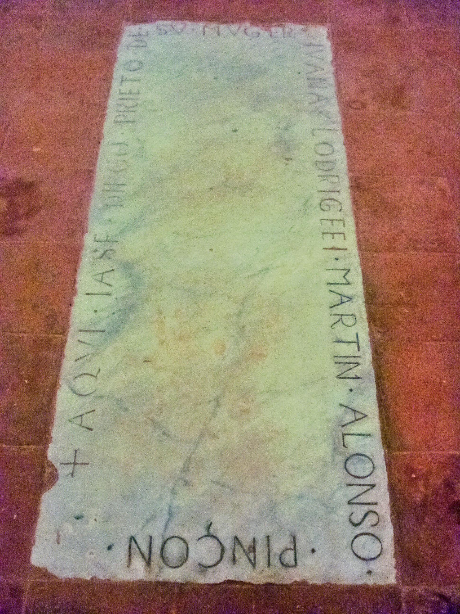 Tumba de Martín Alonso Pinzón en el monasterio de La Rábida (Huelva, España)